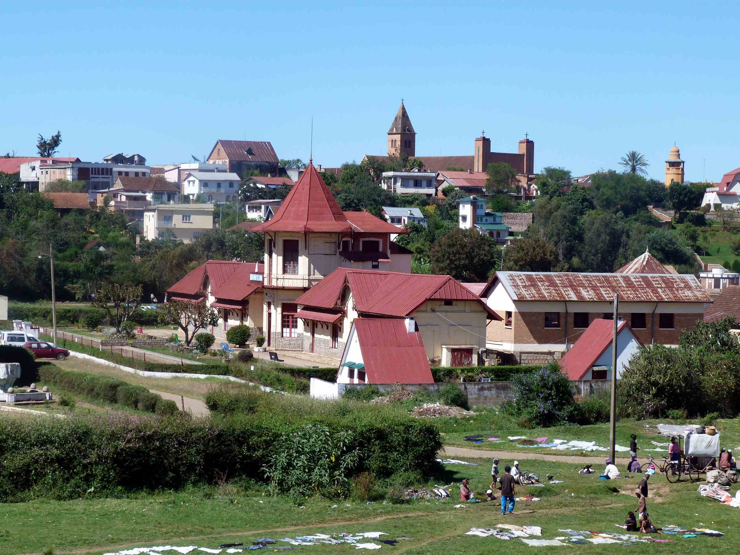 Jour de lessive à Antsirabe, Madagascar.